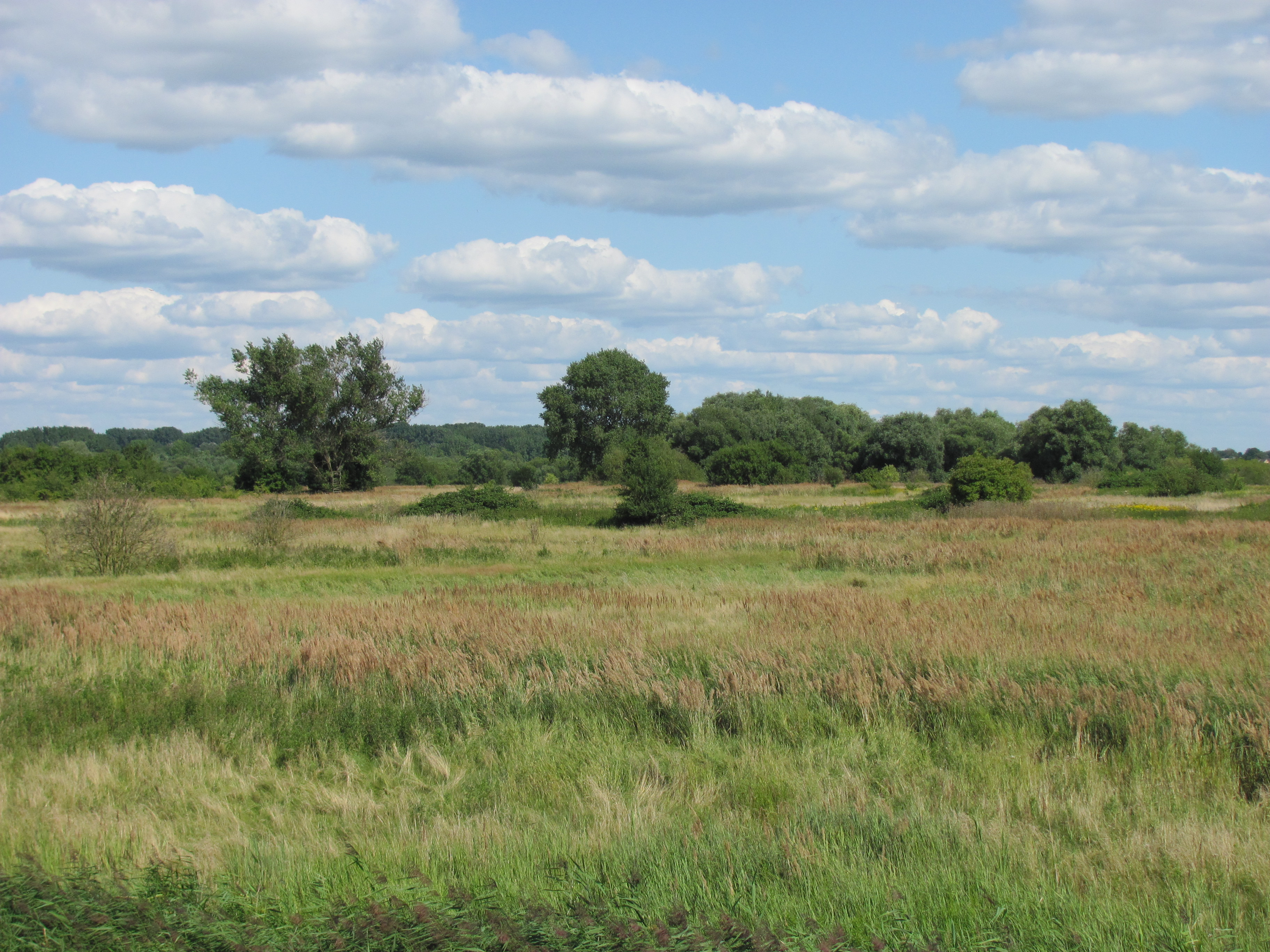 Gebiet Spadenlander Busch im Naturschutzgebiet Auenlandschaft Norderelbe, Hamburg-Wilhelmsburg